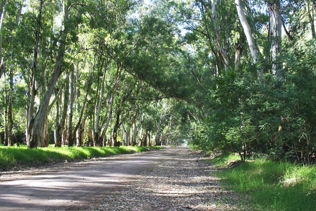 Una calle interna del vivero municipal, América, Rivadavia, Buenos Aires, Argentina